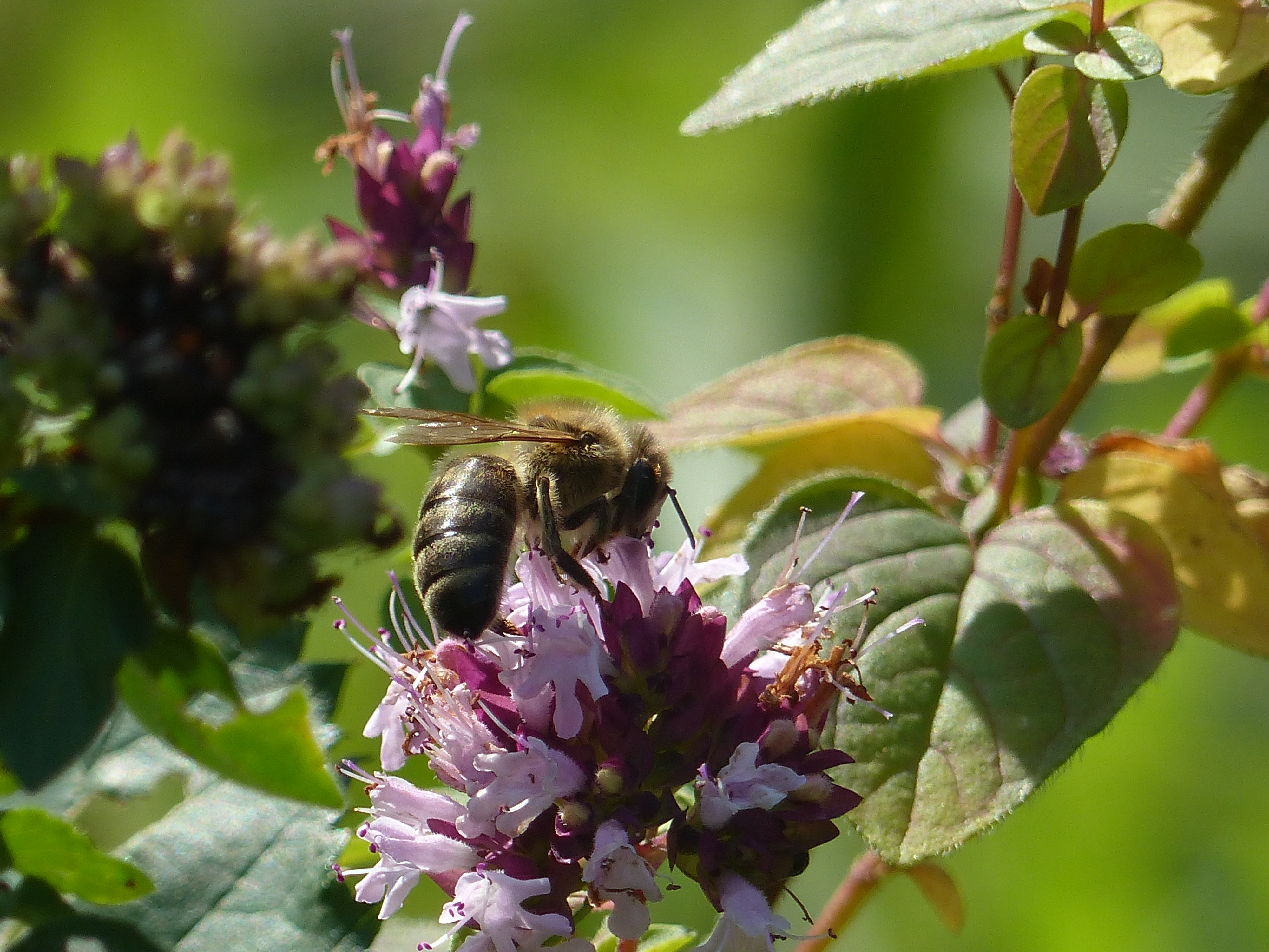 Virágon legelő méh. A felvétel 2016. augusztus 8-án készült a Sashegyen, Budapesten.